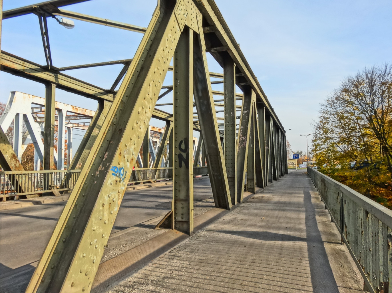 Most w ciągu ul. Mińskiej w Bydgoszczy nad Kanałem Bydgoskim